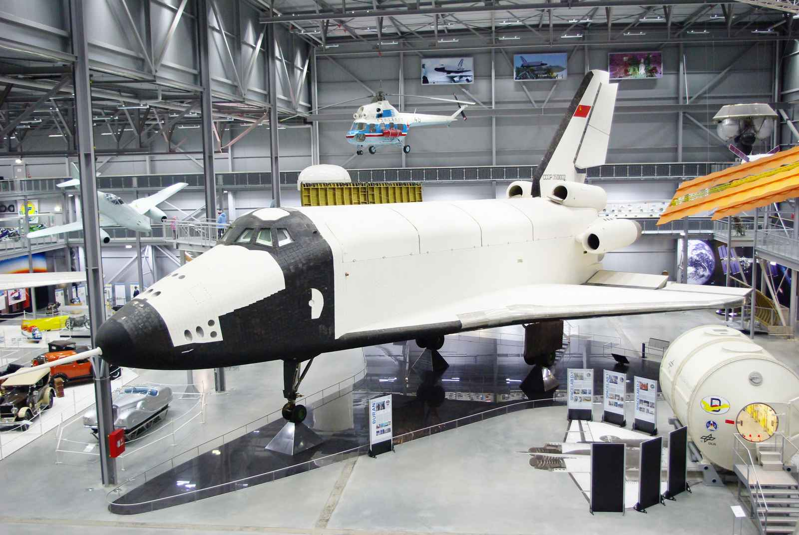 БТС 002 в техническом музее Шпайера